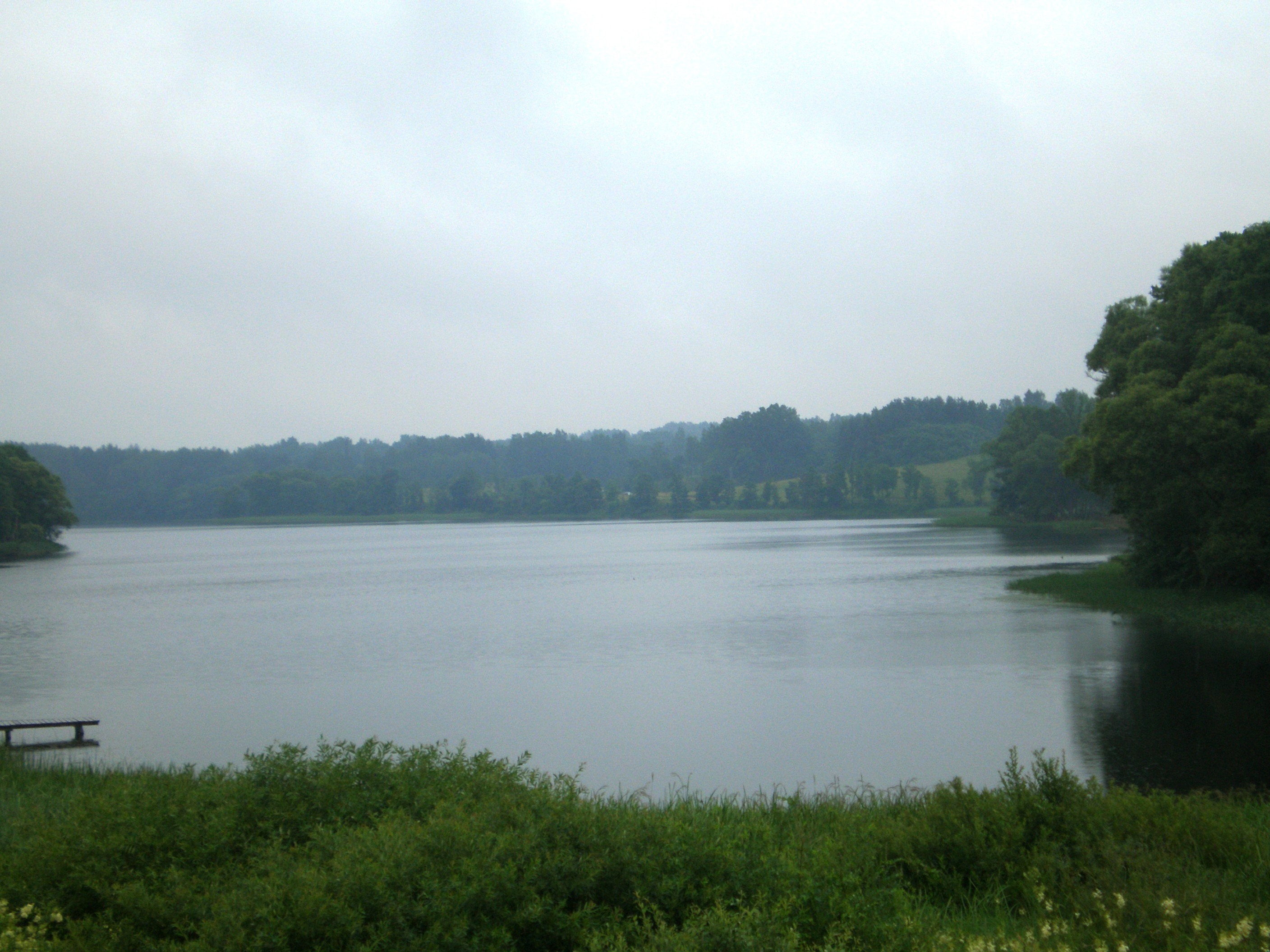 Tauragnas Lake